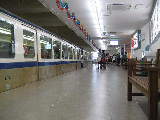 姫路モノレール展示室（旧駅舎内）